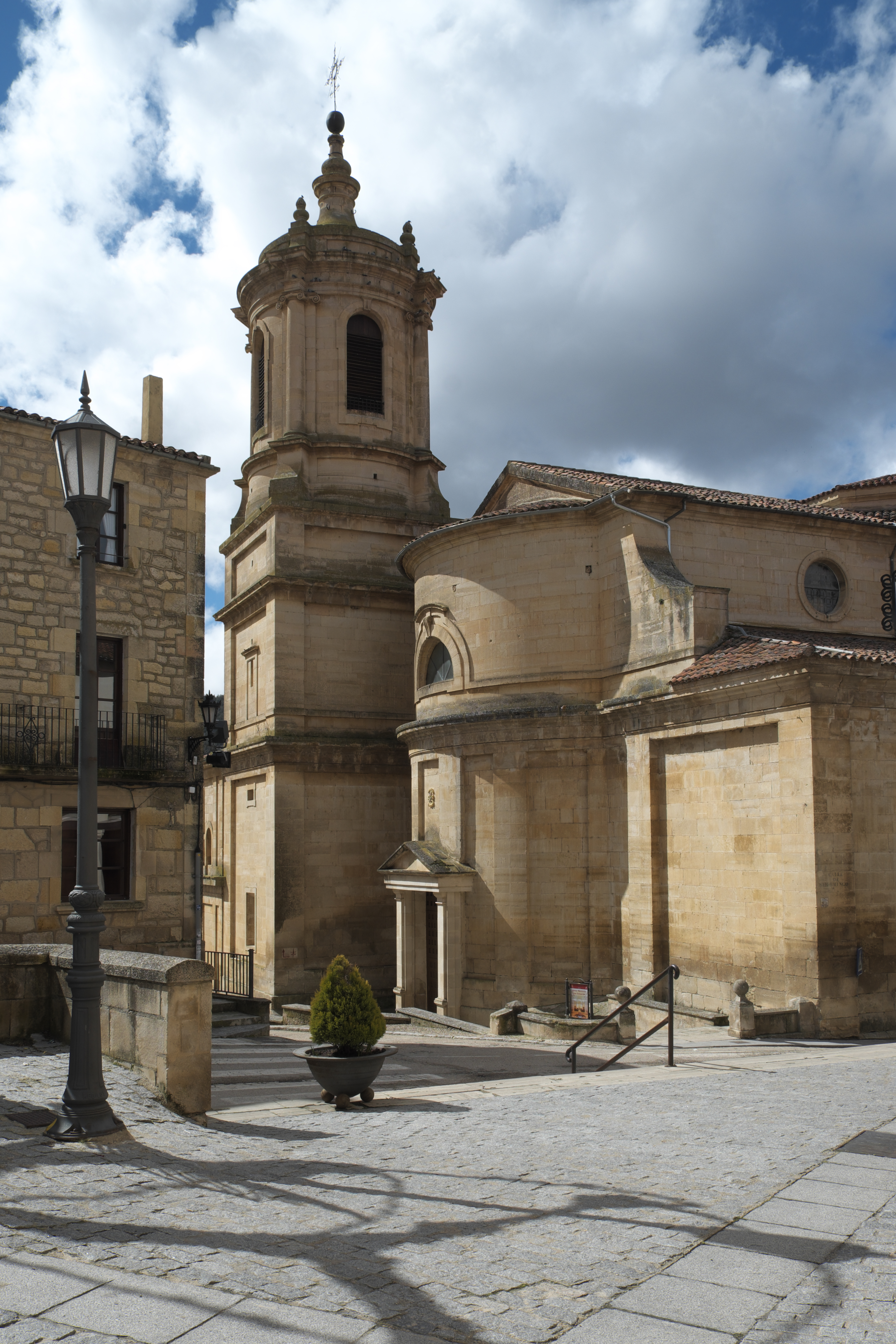 Kloster Santo Domingo de Silos in Santo Domingo de Silos in der Provinz Burgos (Region Kastilien-León/Spanien), Klosterkirche